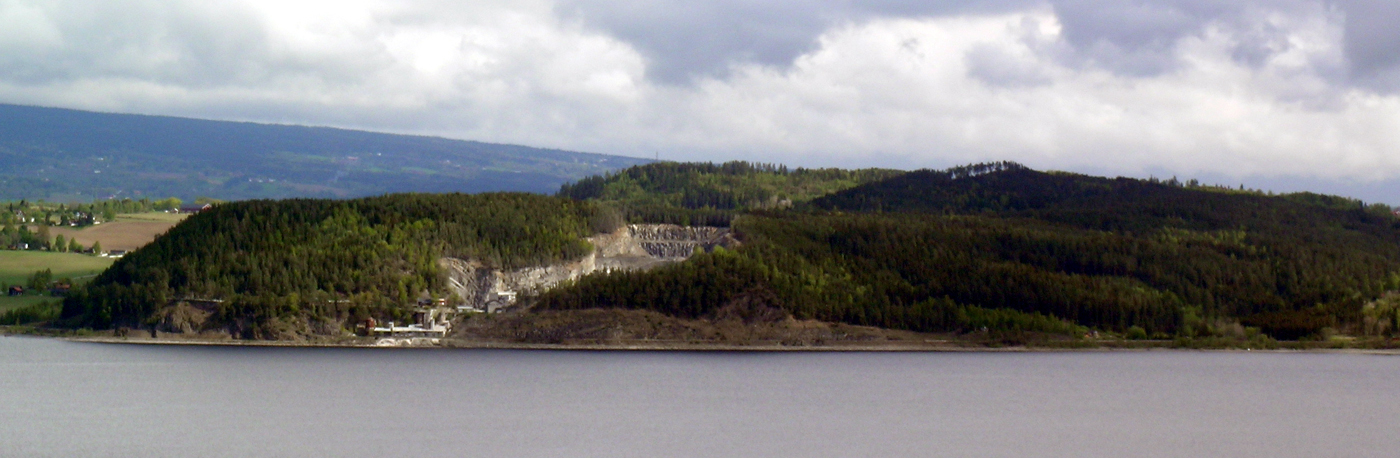 Furuberget, Hamar, Norway.